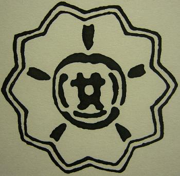 枕崎高女校章